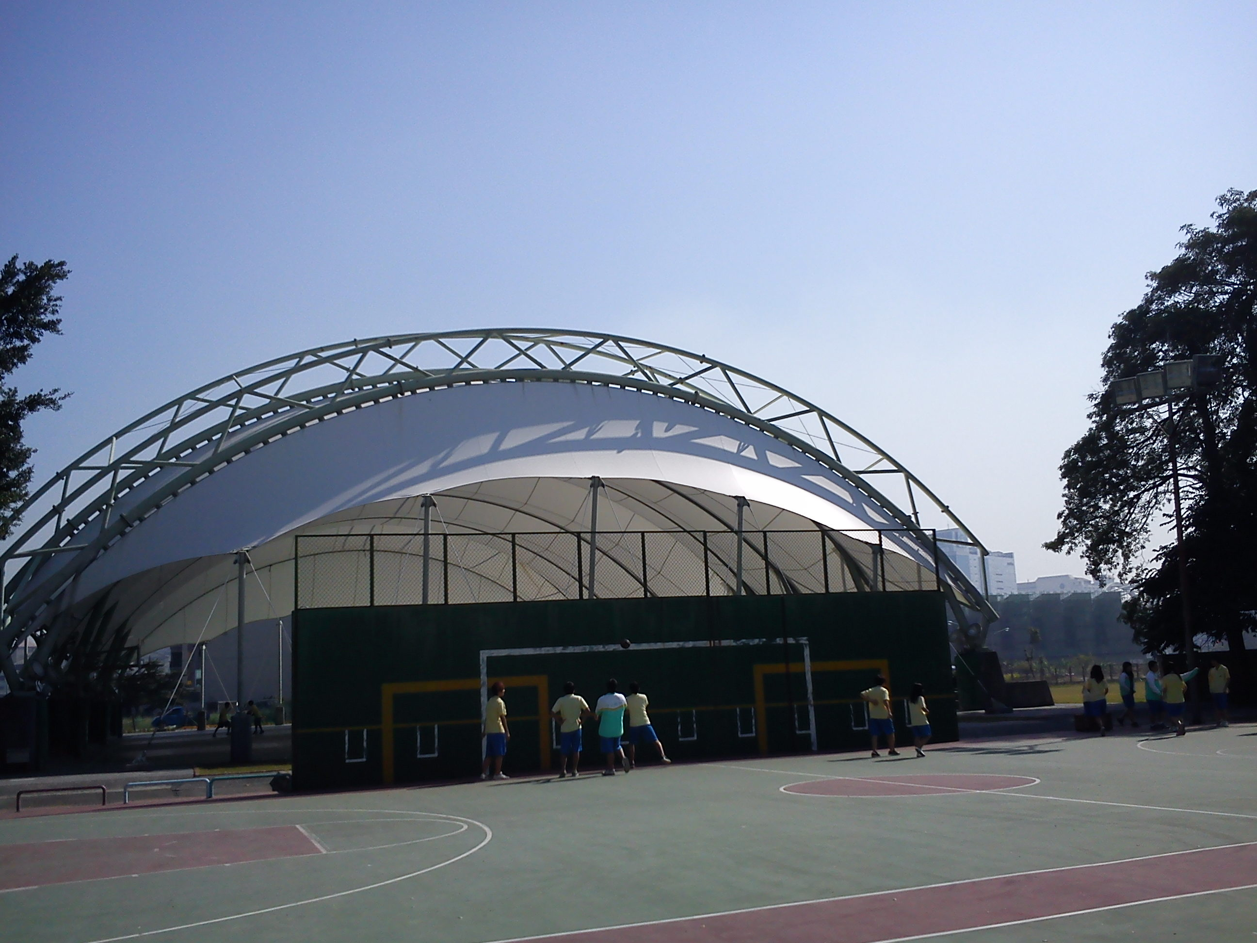 中山高級中學膜構球場的中午